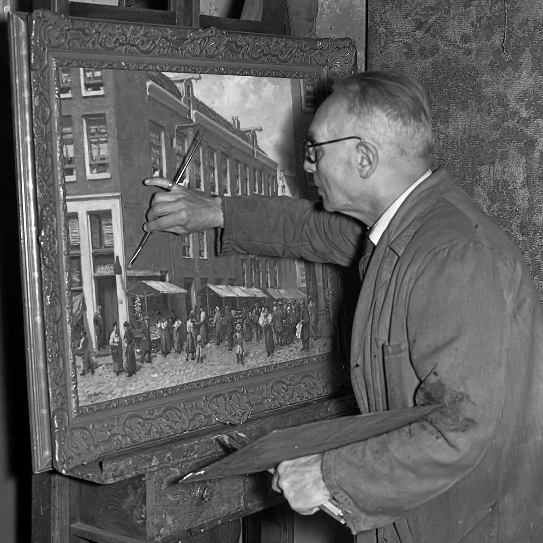 De Amsterdamse schilder G. J. Staller wordt op 2 januari 1955 75 jaar oud 27 december 1954